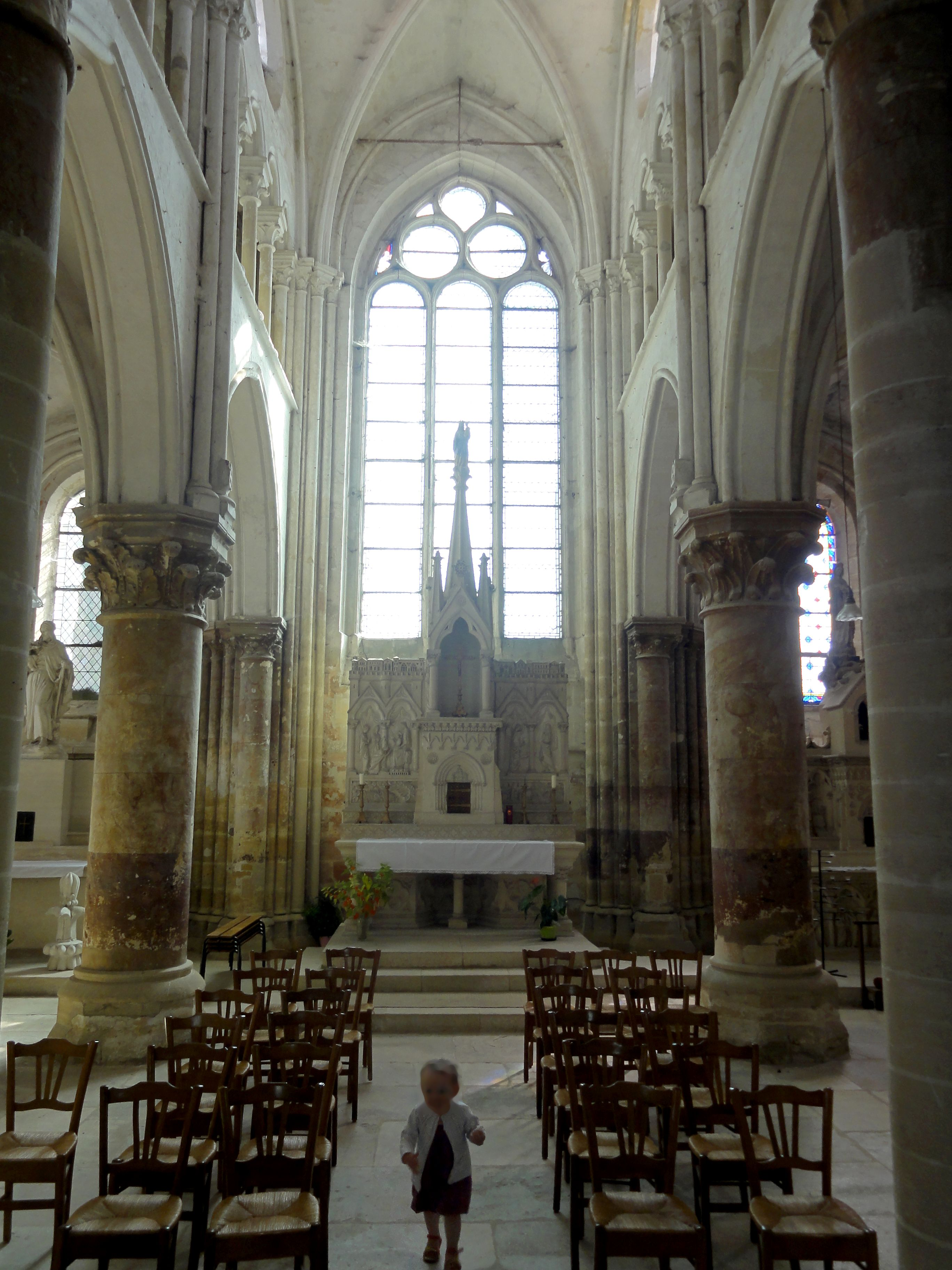 Chœur.